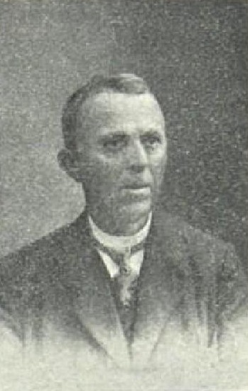 František Dvořák (1855-1934), rakouský politik